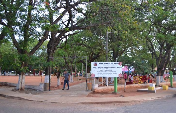 Aspecto del que fuera el primer campo de juego que tuvo el Club 12 de Octubre de Itauguá. Actualmente está ocupado por la plaza Martín de Barúa.